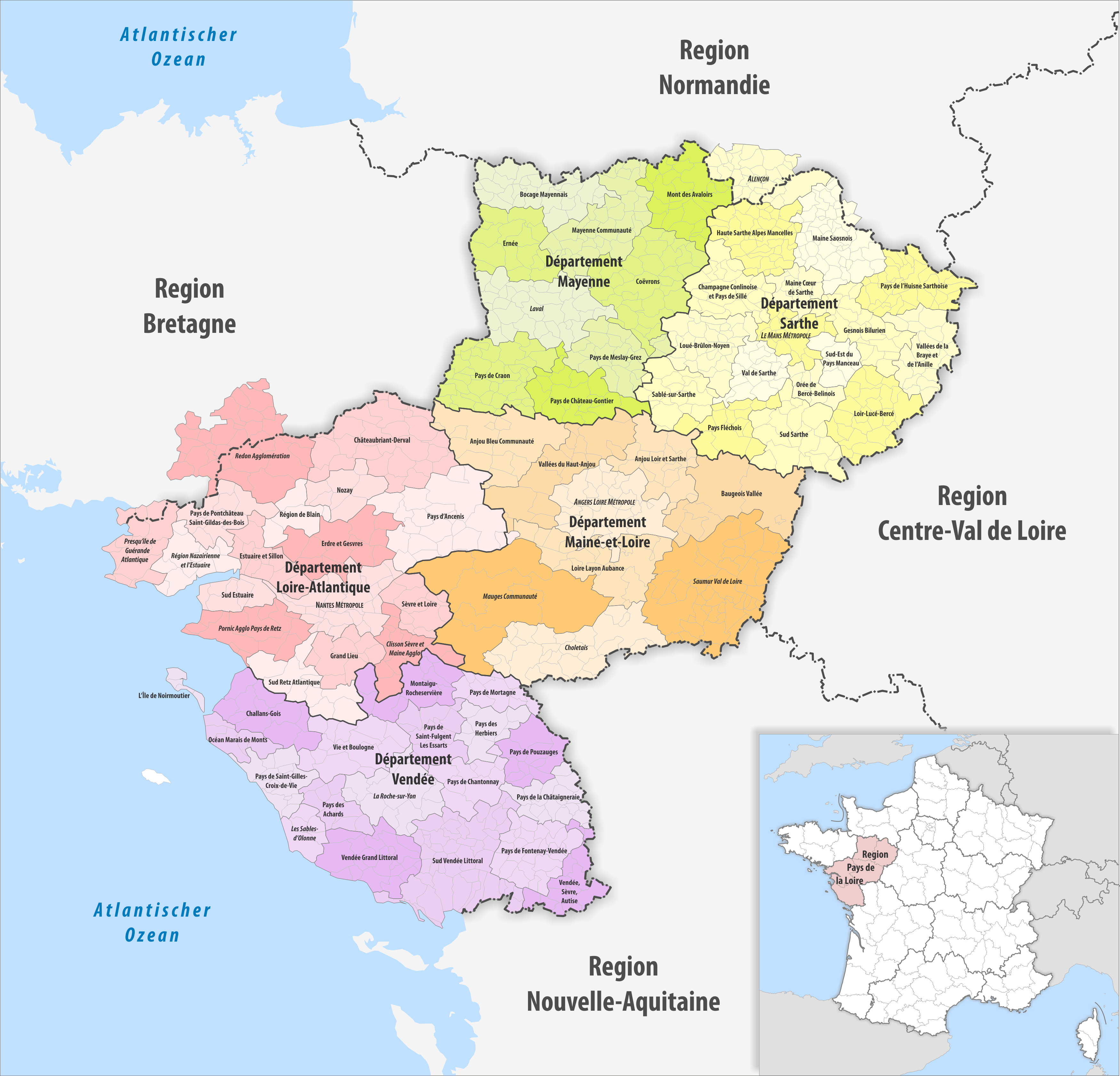 Gemeinden, Gemeindeverbände und Départemente in der Region Pays de la Loire